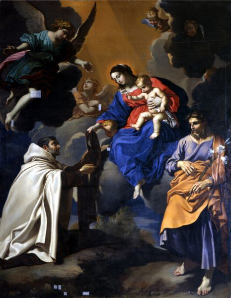 La Vierge remettant le scapulaire à saint Simon Stock.label QS:Lfr,"La Vierge remettant le scapulaire à saint Simon Stock."